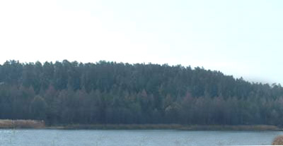 Vy över Sunnerstaåsen från Sunnerstaviken